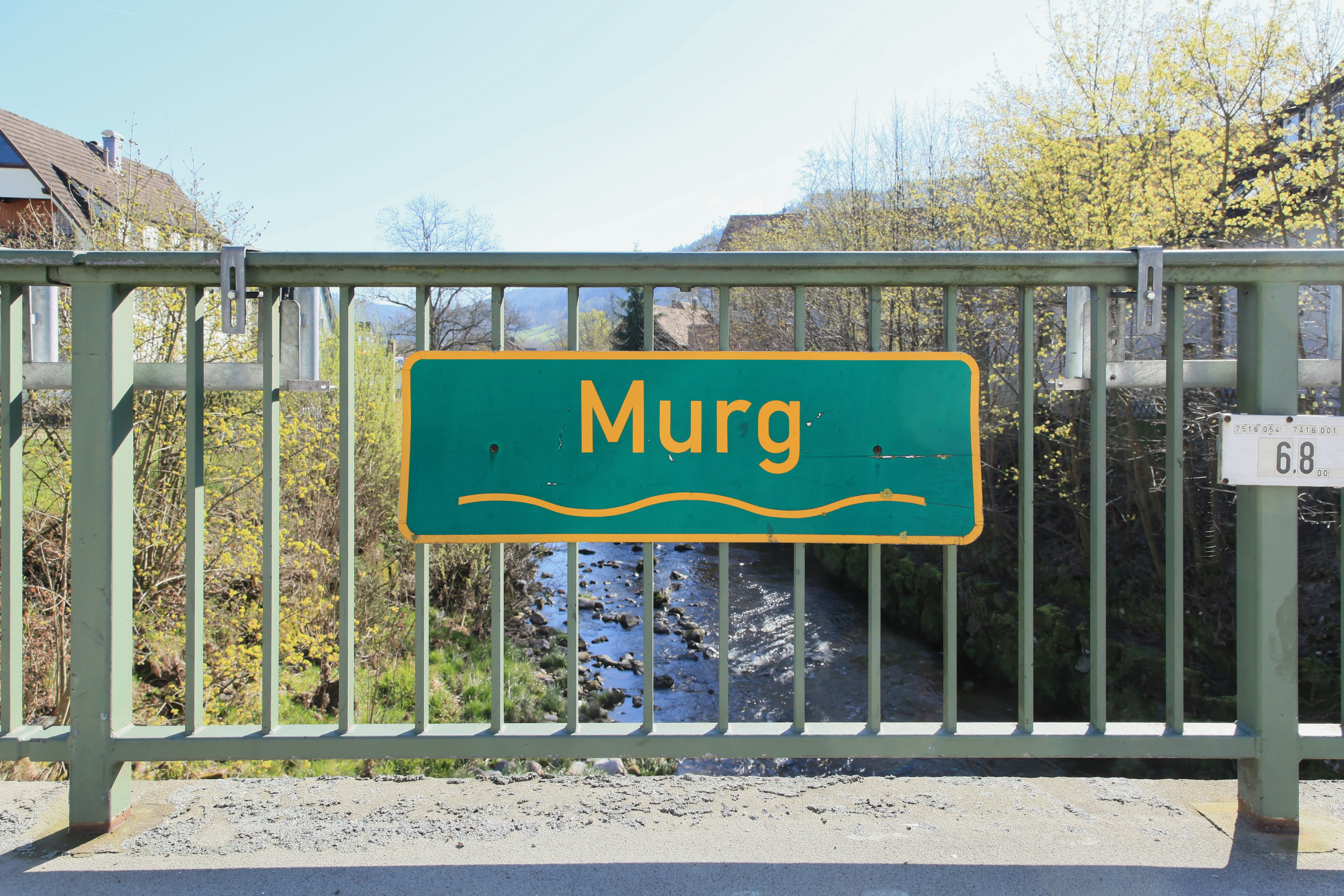 Murg an der Murgbrücke der Freudenstädter Straße in Baiersbronn